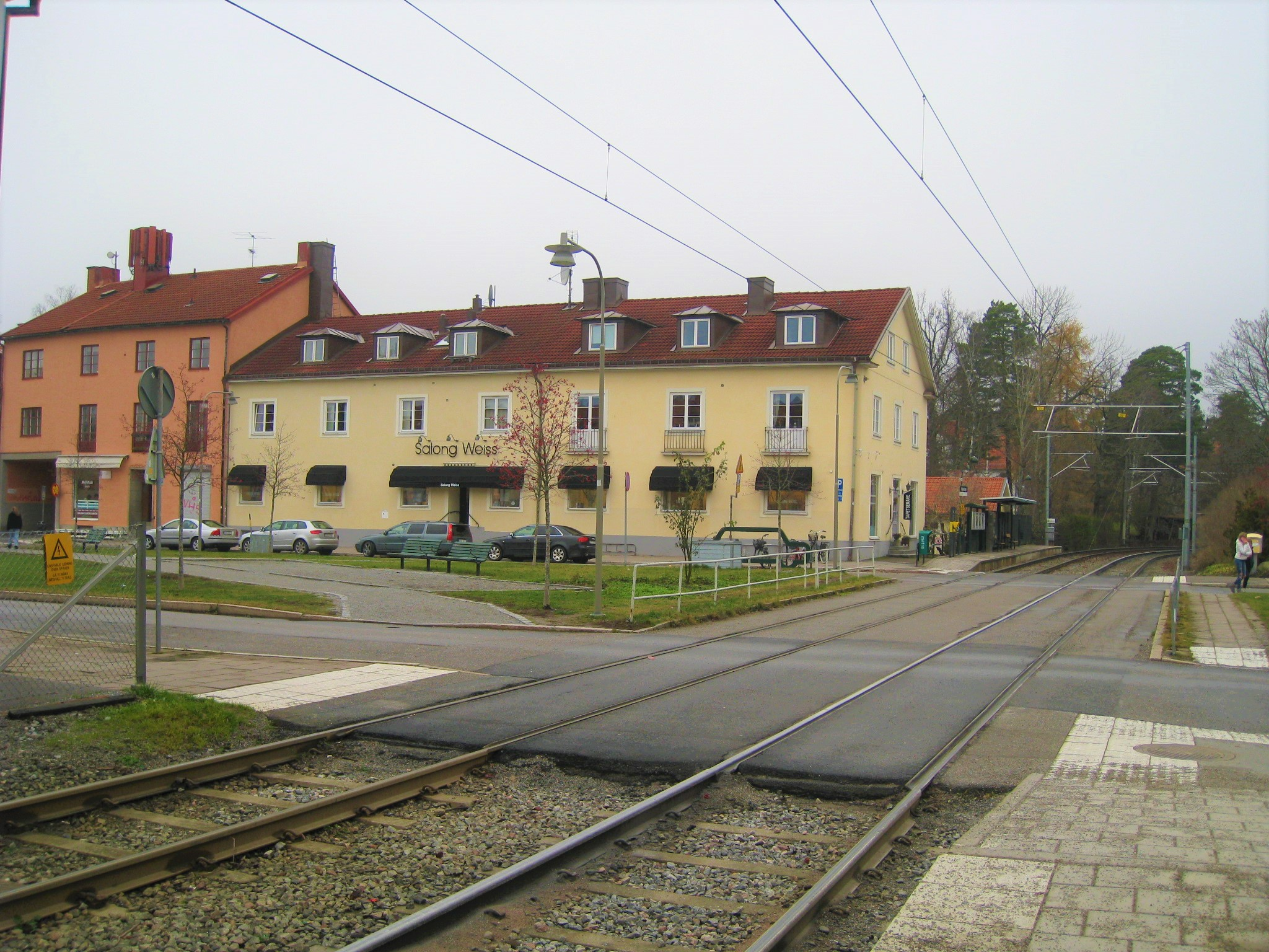 Höglandstorget 5, Höglandet, Bromma, Stockholm.